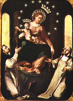 Foto Del Quadro della Madonna di Pompei (and San Domenico at the left side and Santa Caterina of Siena on the right)